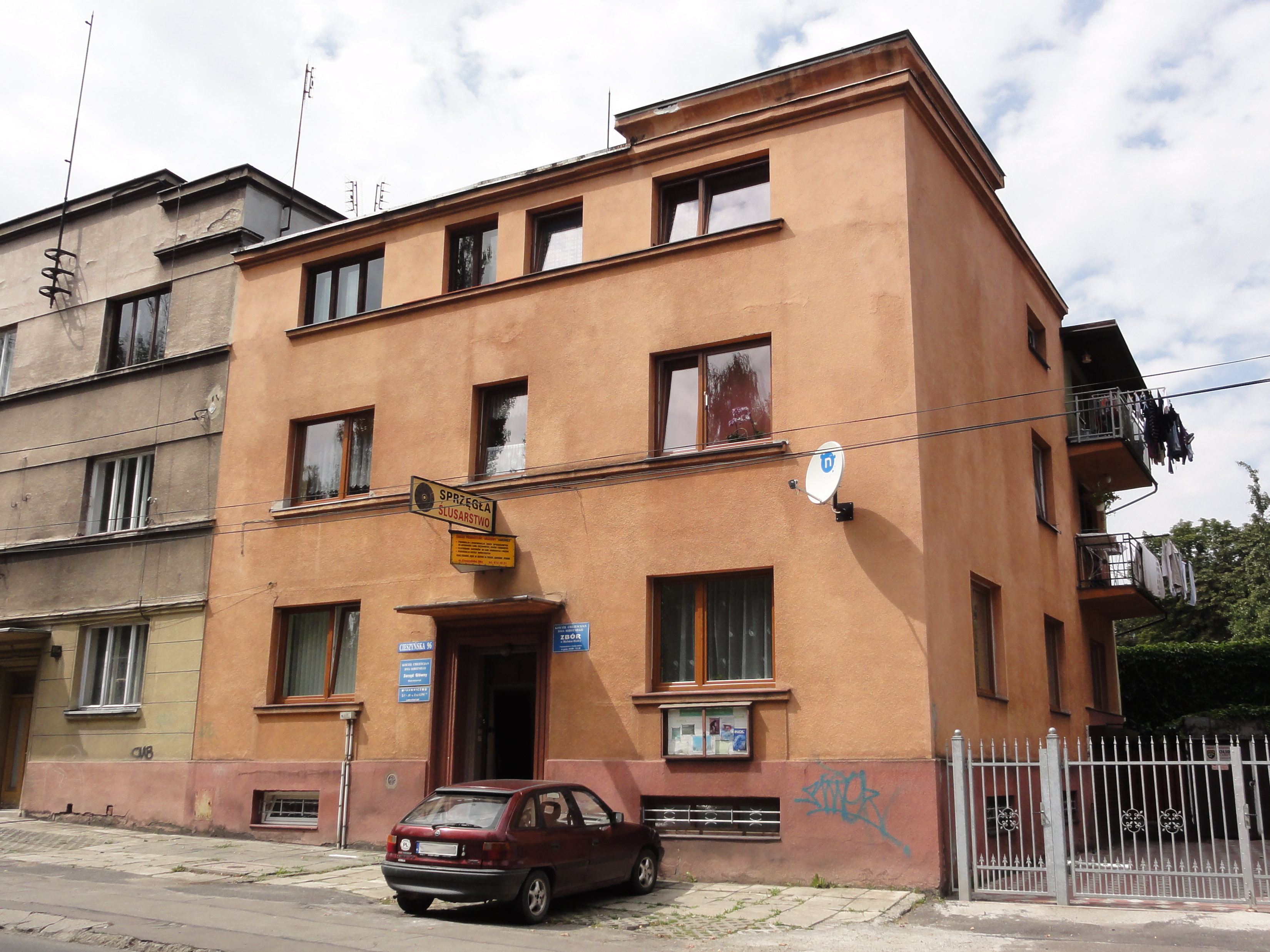 Zbór Chrześcijan Dnia Sobotniego na ul. ul. Cieszyńskej 96 w Bielsku-Białej